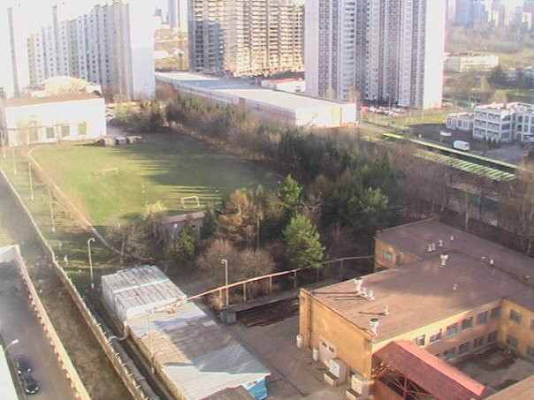 Технические сооружения метро-2 вблизи станции метро Раменки, под одним из зданий расположен ствол к станции линии Д6. Ранее на этом месте была строительная площадка Трансинжстроя, занимающаяся строительством тоннеля Д6 и подземного бункера в Раменках, позднее СМУ 155 ОАО Трансинжстрой, ныне охраняемый объект войсковой части 95006 ГУСП. Москва, Мичуринский проспект, 27Б